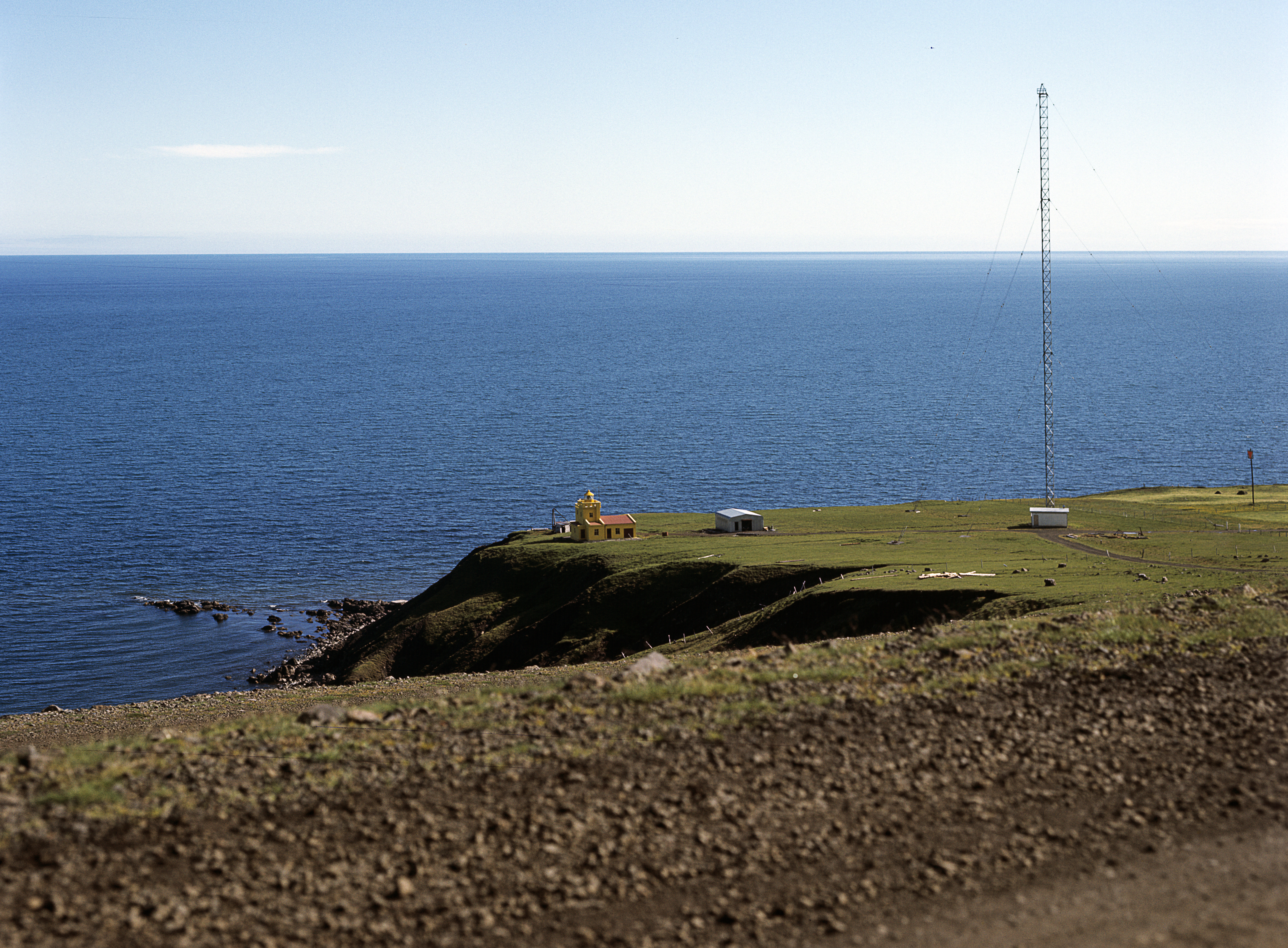 Der Leuchtturm Dalatá nördlich von Siglufjörður.